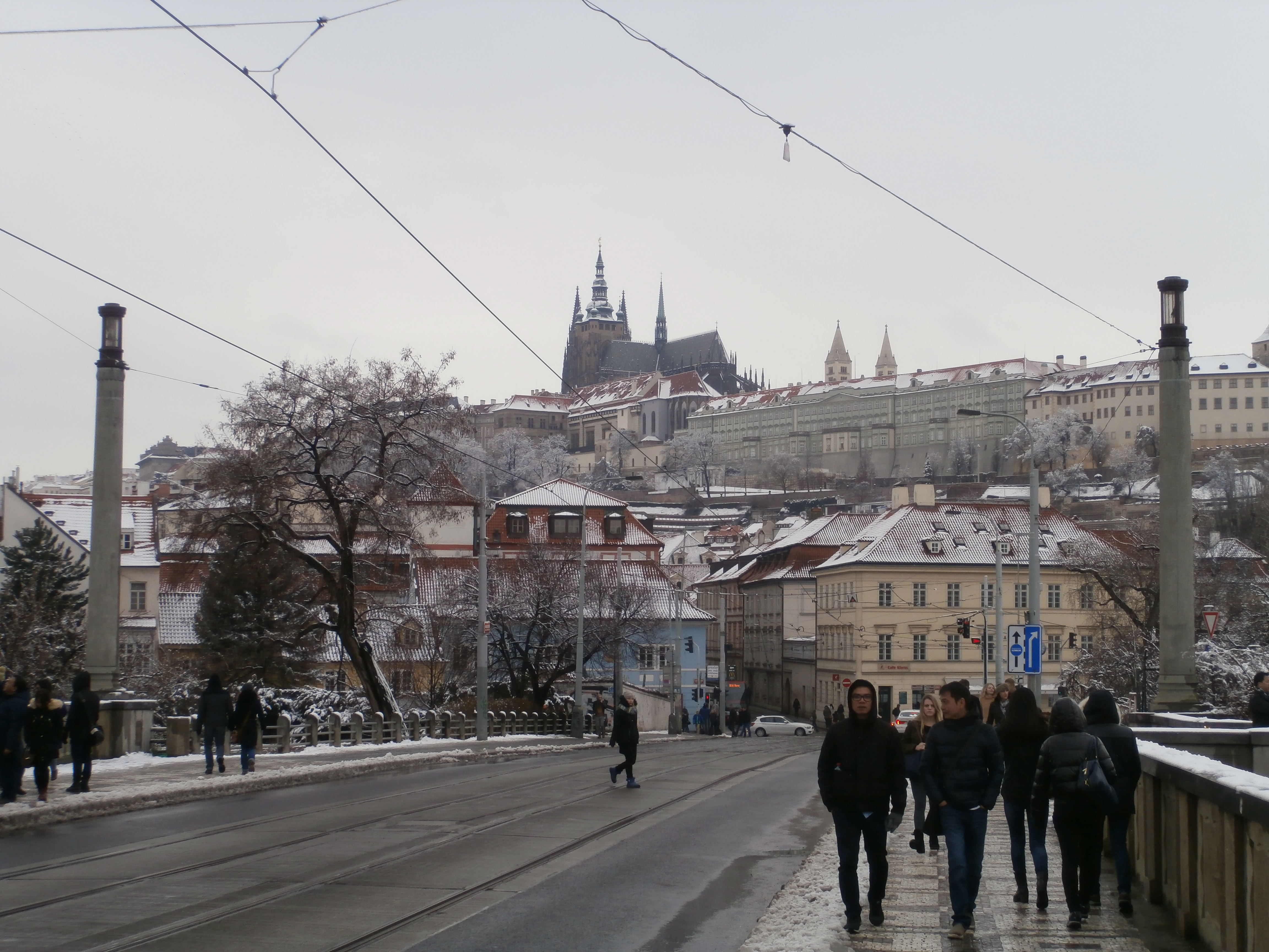 Malá Strana a Hradčany, v pozadí Pražský hrad, v zimě, 1. 3. 2016